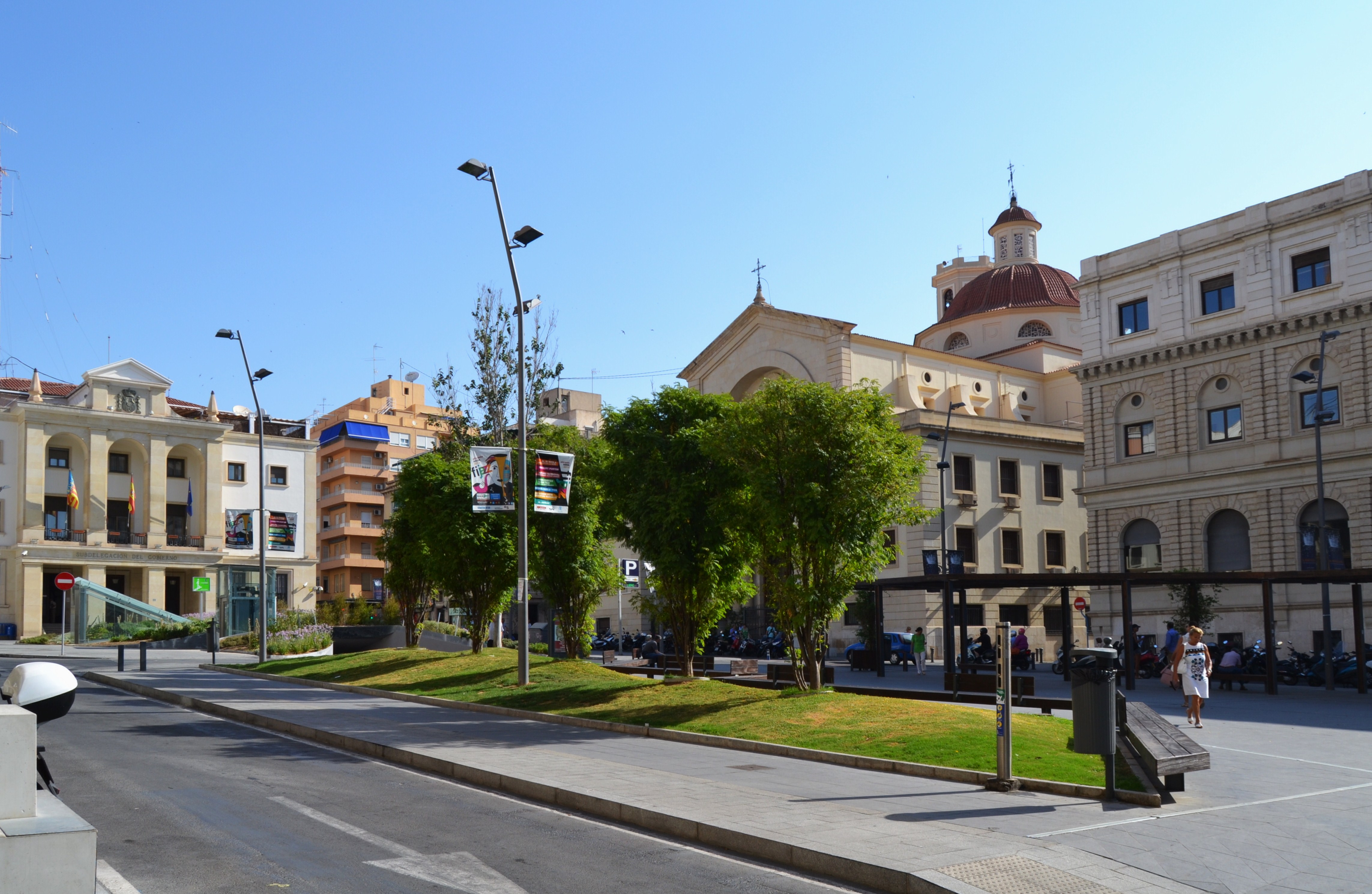 La plaça de la Muntanyeta, Alacant.